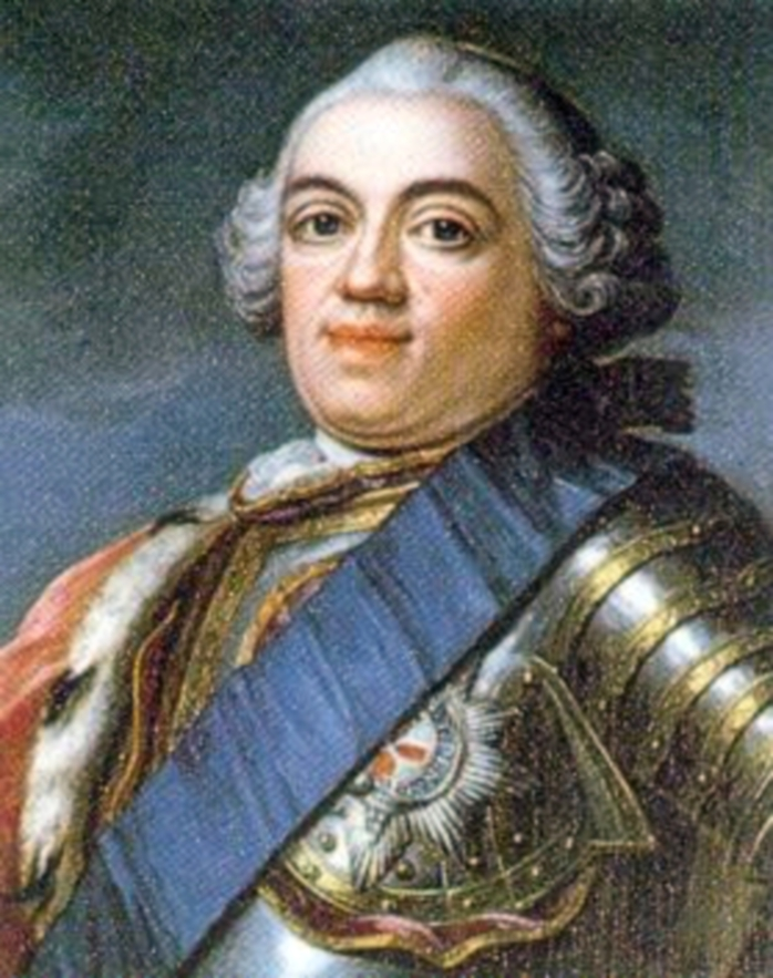 portrait de Guillaume IV d'Orange-Nassau.jpg